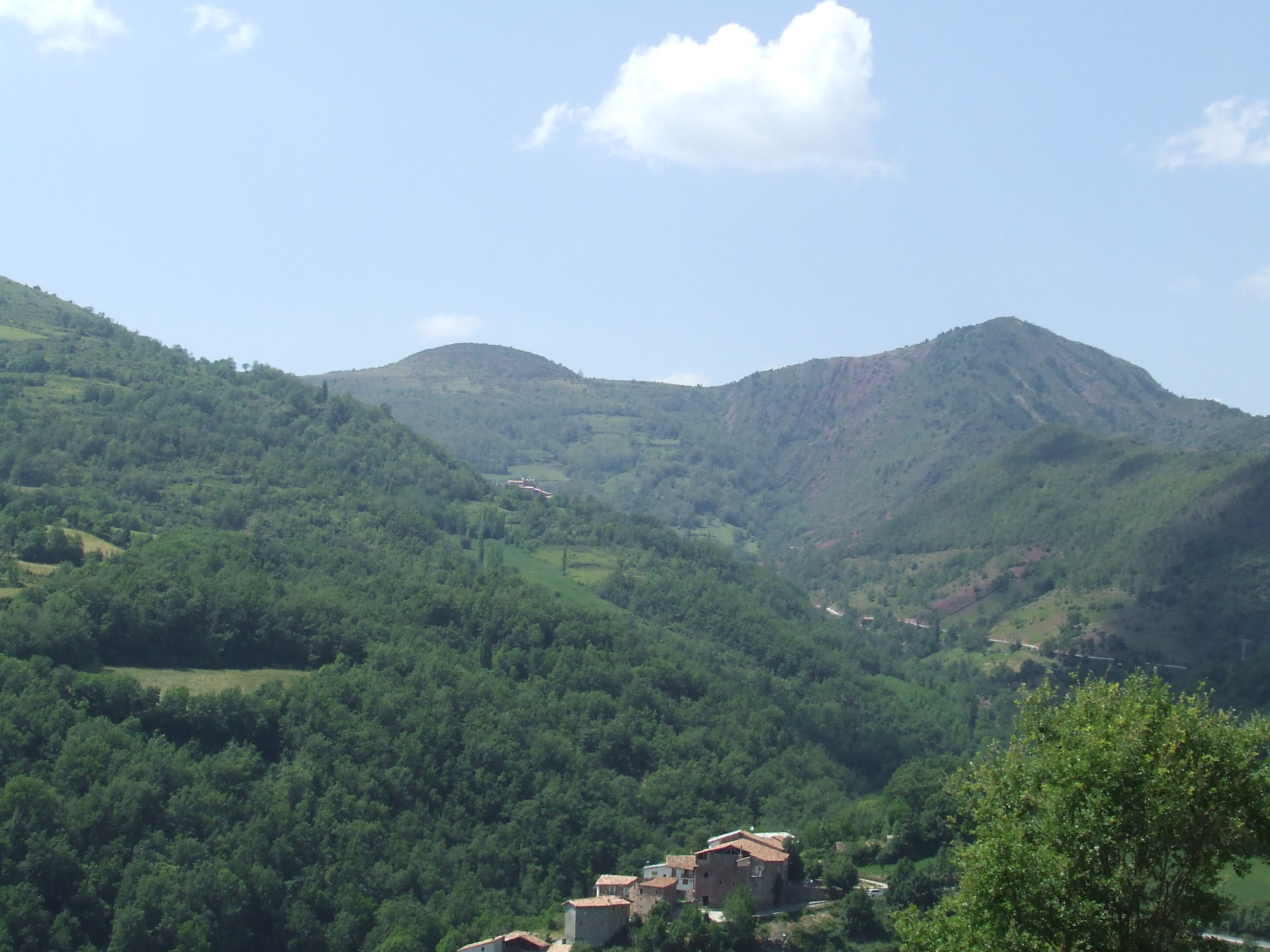 Tossal de Sant Quiri i vall de Sentís (Benés, Sarroca de Bellera, Pallars Jussà)